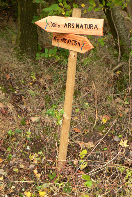 Wegschild Kunstwanderweg Ars natura